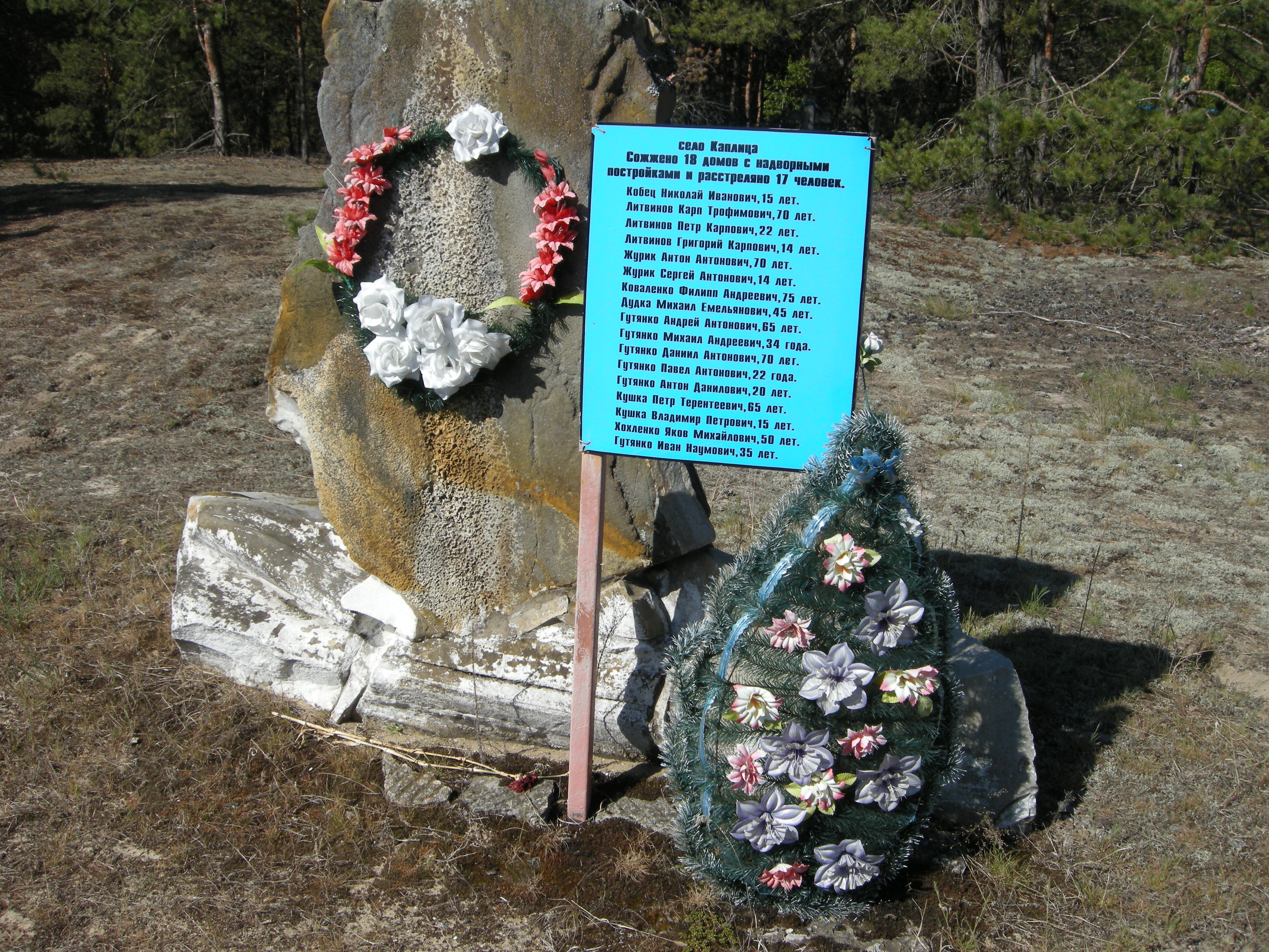 пам'ятний знак загиблим мешканцям хутора Каплиця